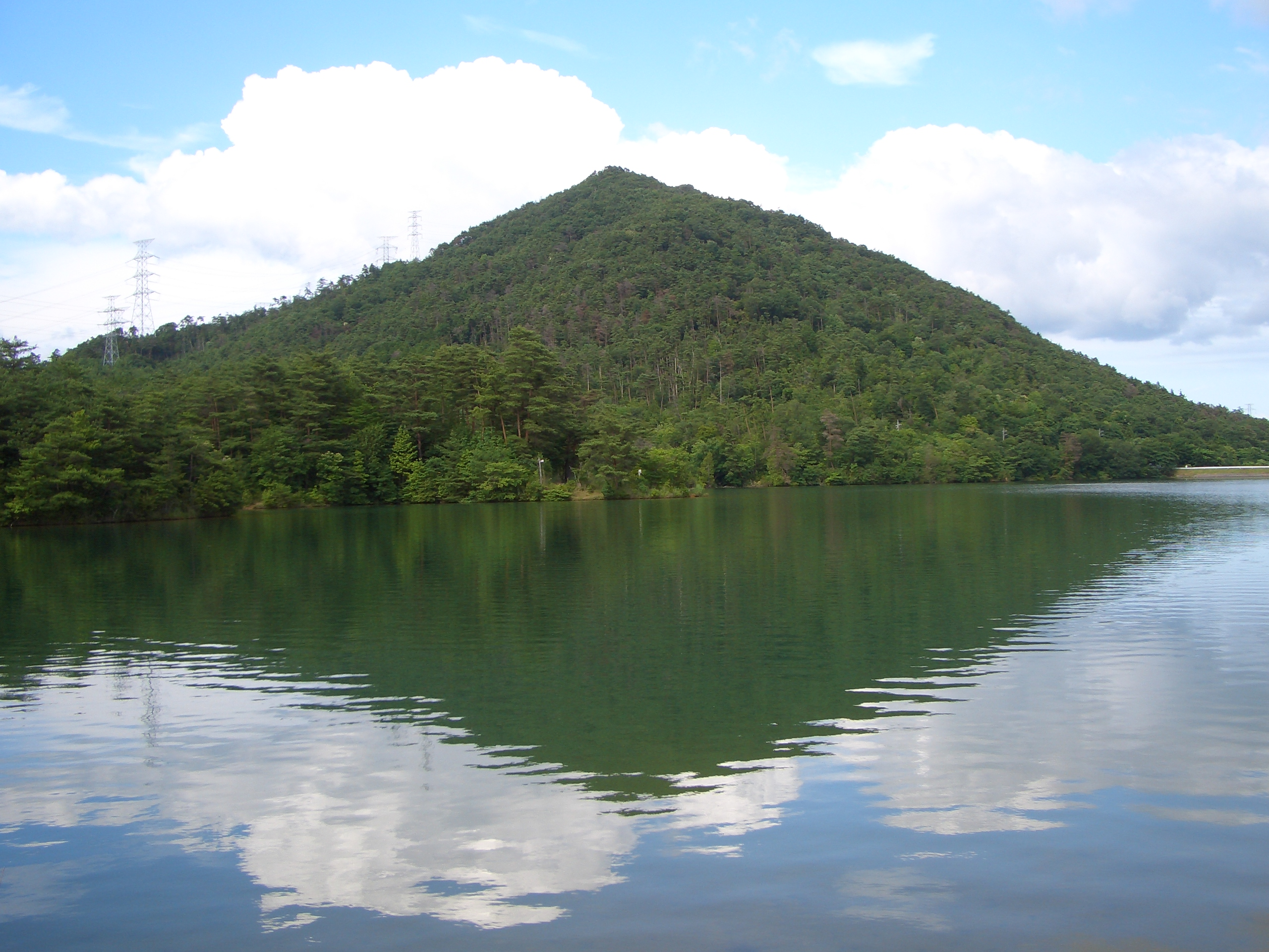 虚空蔵山の写真